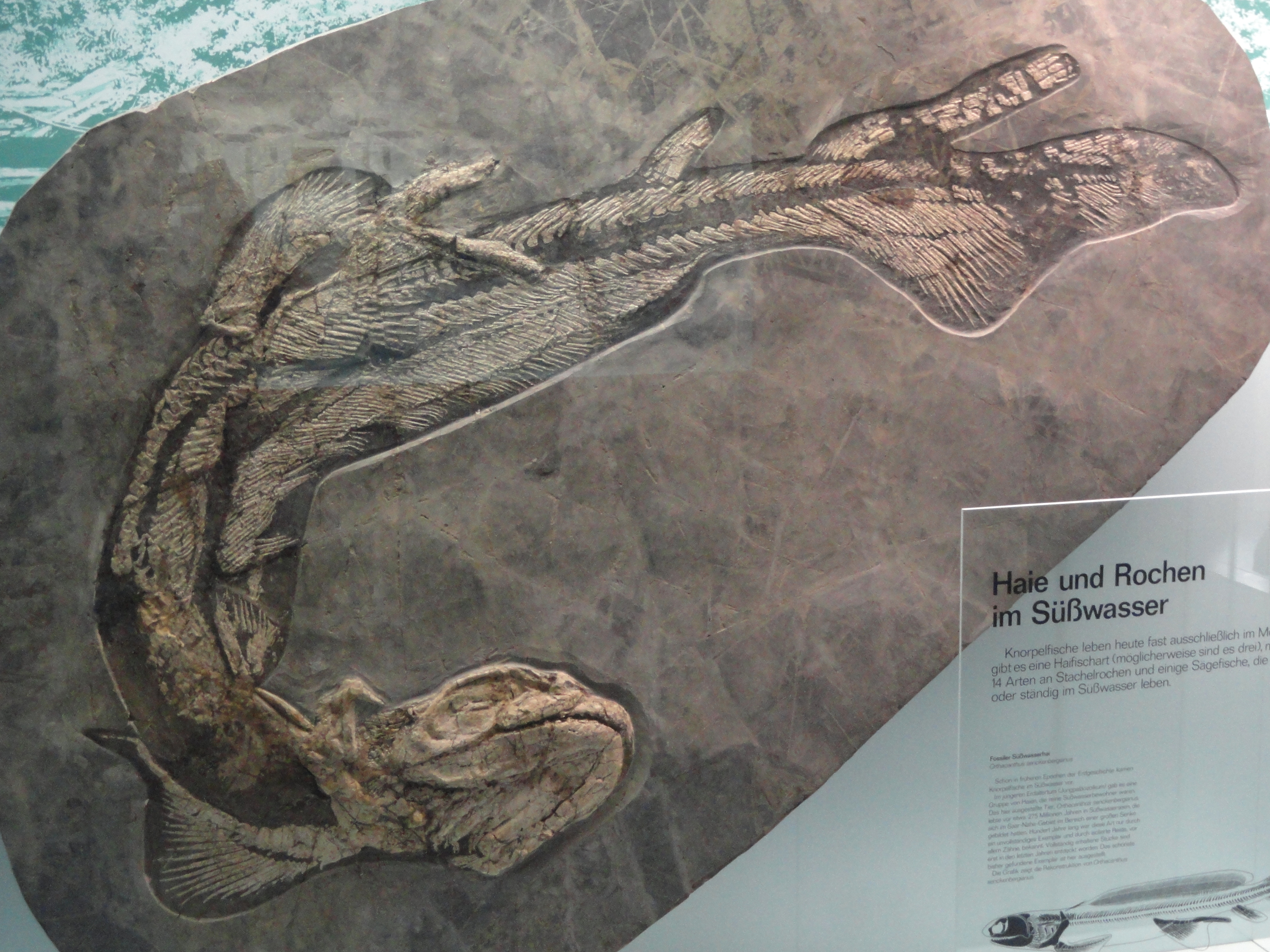 Exhibit in Naturmuseum Senckenberg, Frankfurt am Main, Germany.